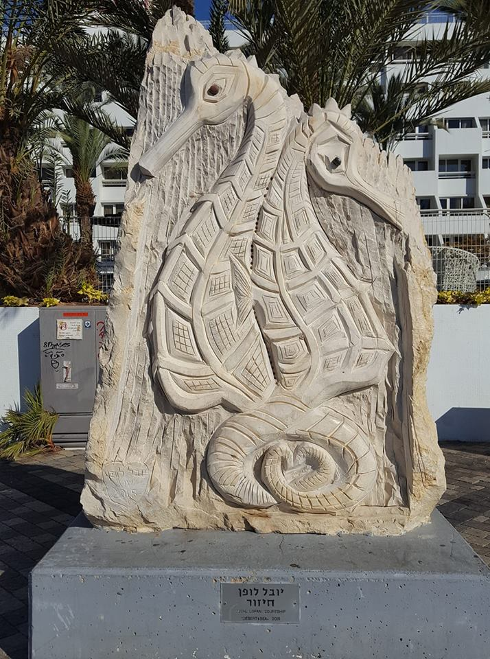 פסל "חיזור" בטיילת החוף הצפוני באילת פרי עבודתו של יובל לופן צילום אלי אלון